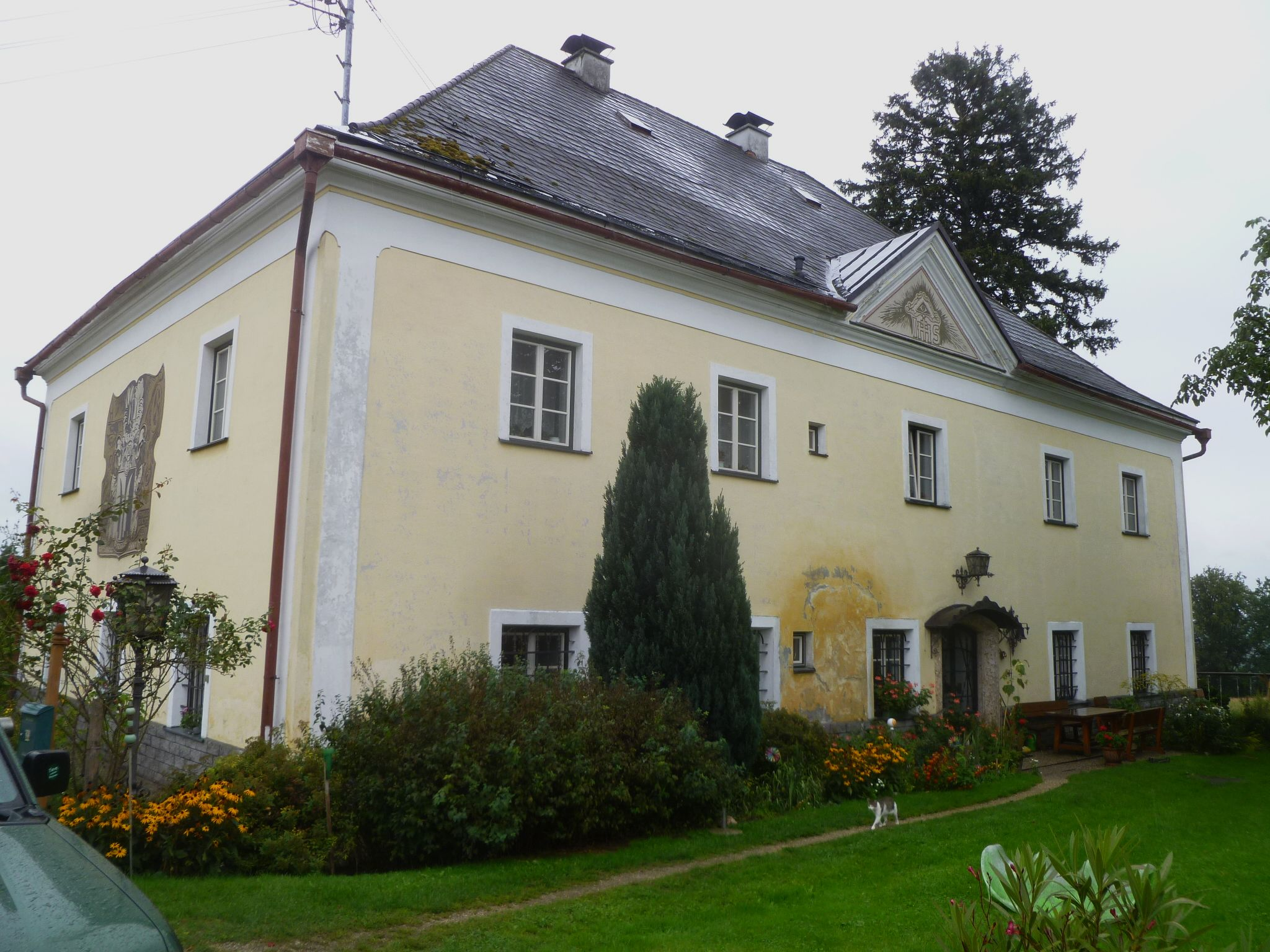 Schloss Katzenberg Rückseite